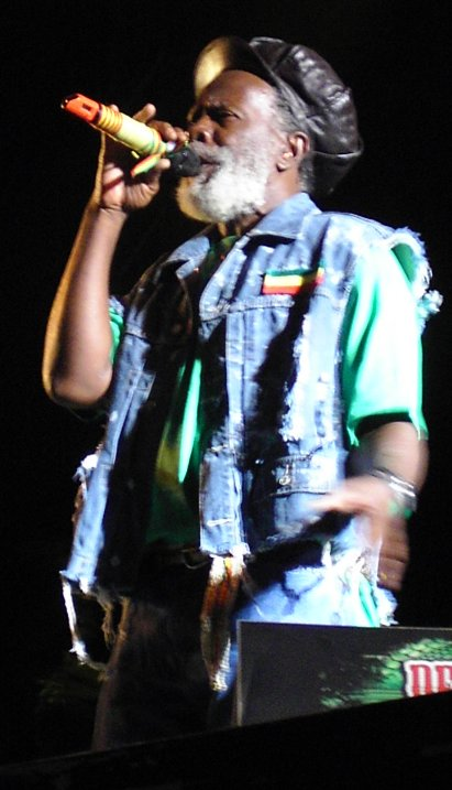 Burning Spear während seines Auftritts auf der Hauptbühne des Chiemsee Reggae Summer 2006